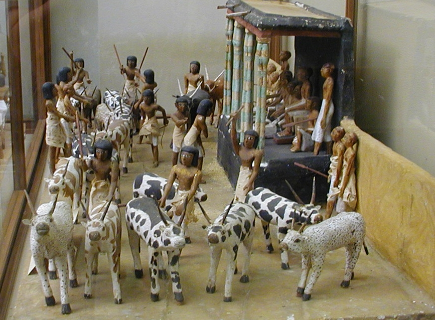 Meketre überwacht die Viehzählung. Modell im Ägypt. Museum Kairo.